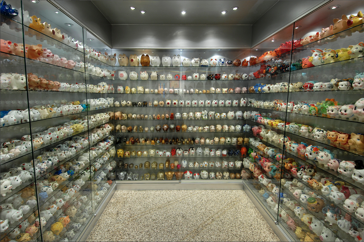 Schweinetressor. Sparschweine